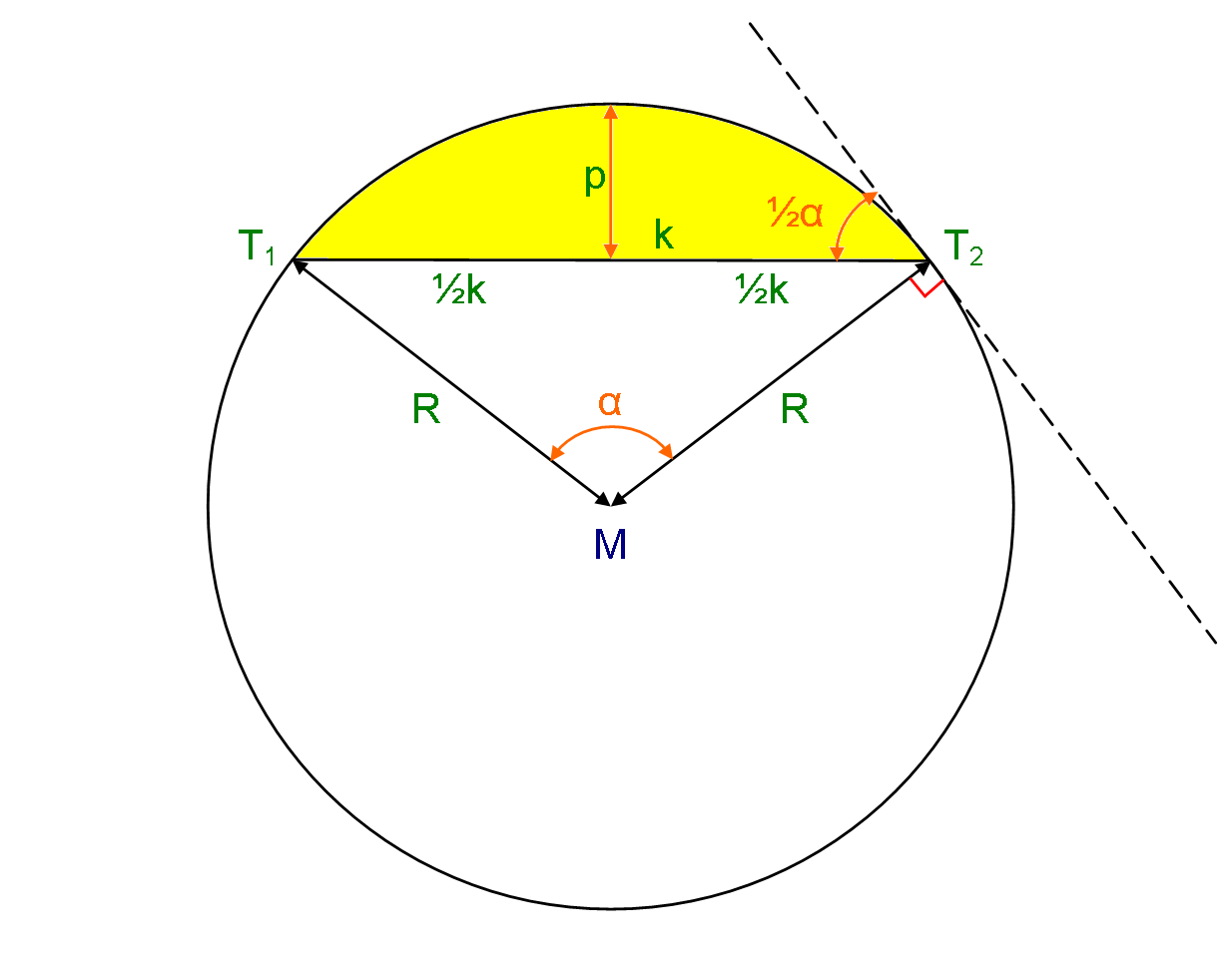 Schematische weergave van het cirkelsegment en enkele bijbehorende aanduidingen